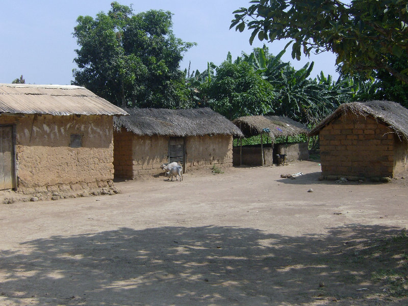 Lehmhütten in Baboua, Präfektur Nana-Mambere in der Zentralafrikanischen Republik